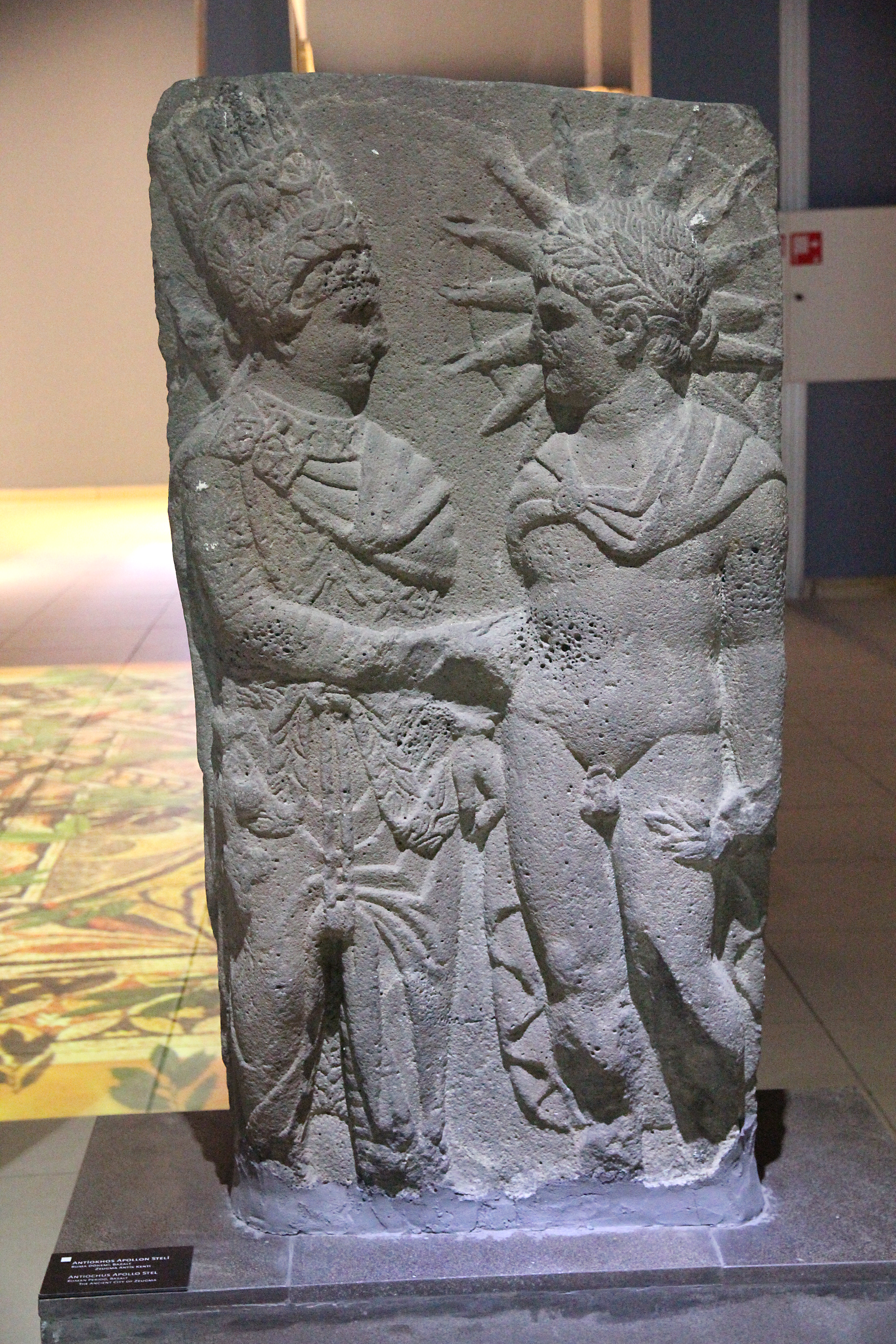 Zeugma-Mosaik-Museum, Gaziantep, Türkei, Dexiosis von Antiochos I. von Kommagene mit Apollo, aus Sofraz Köy (heute Üçgöz bei Besni)